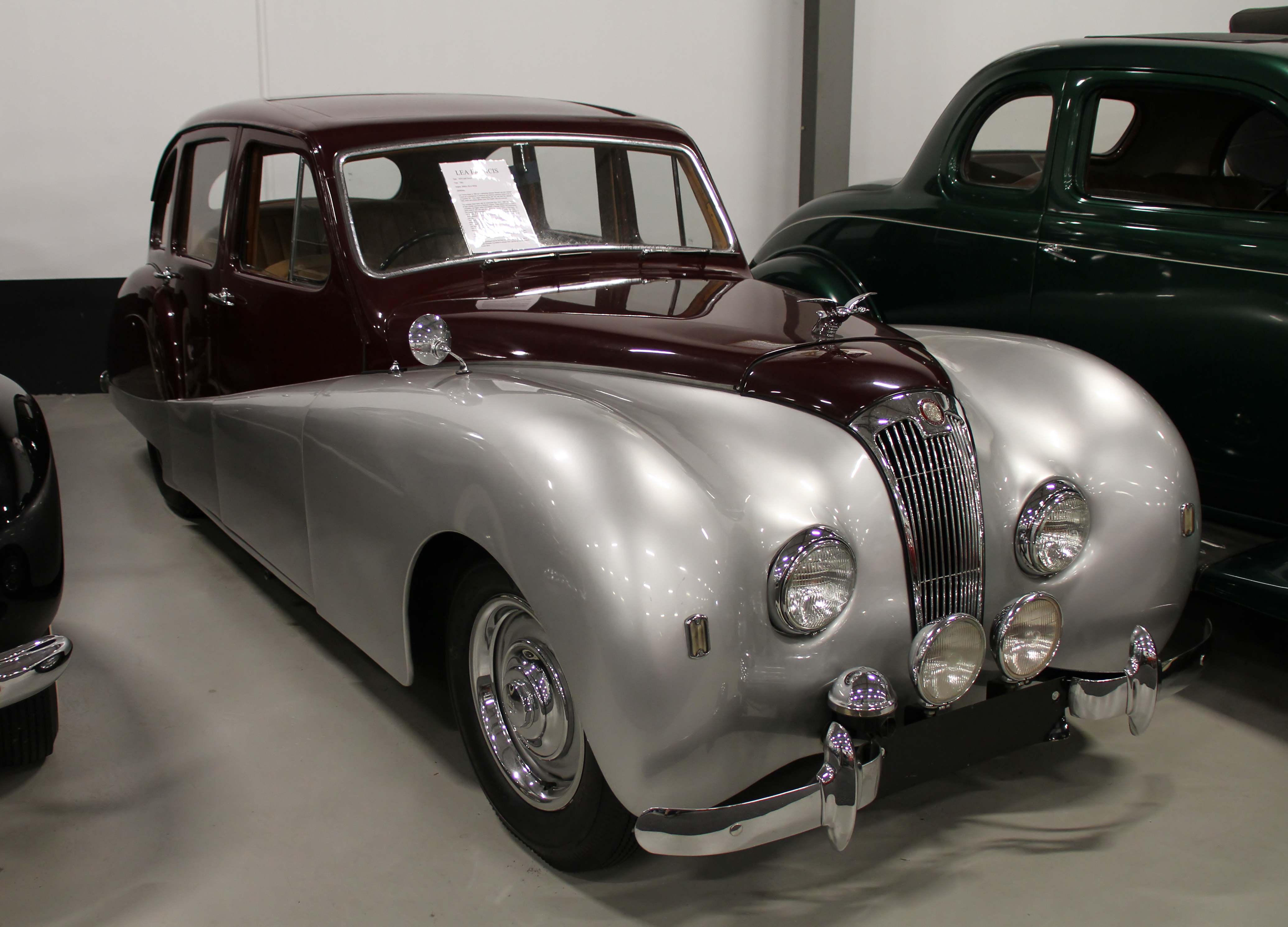 1953 Lea Francis 14-70 saloon